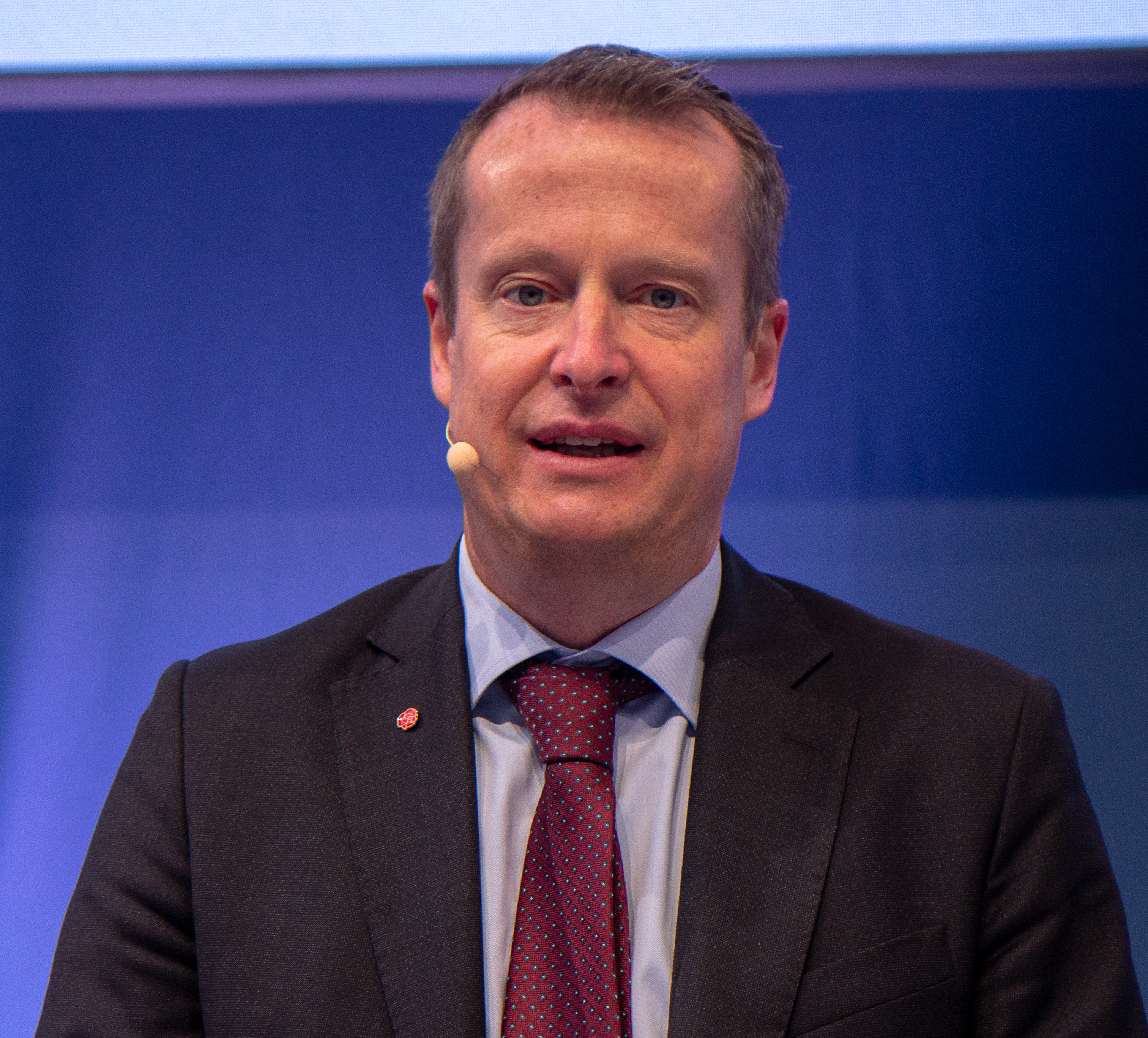 Anders Ygeman